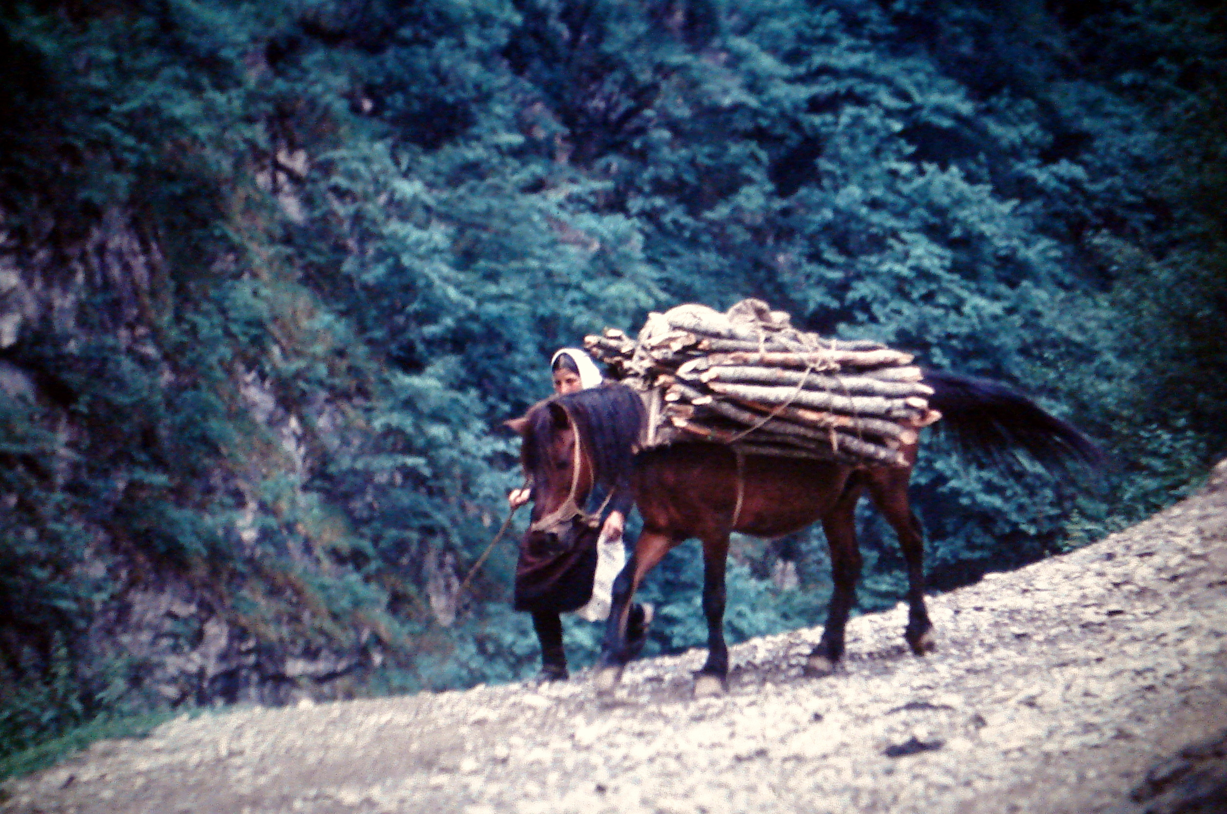 1972 RUGOVO SCHLUCHT